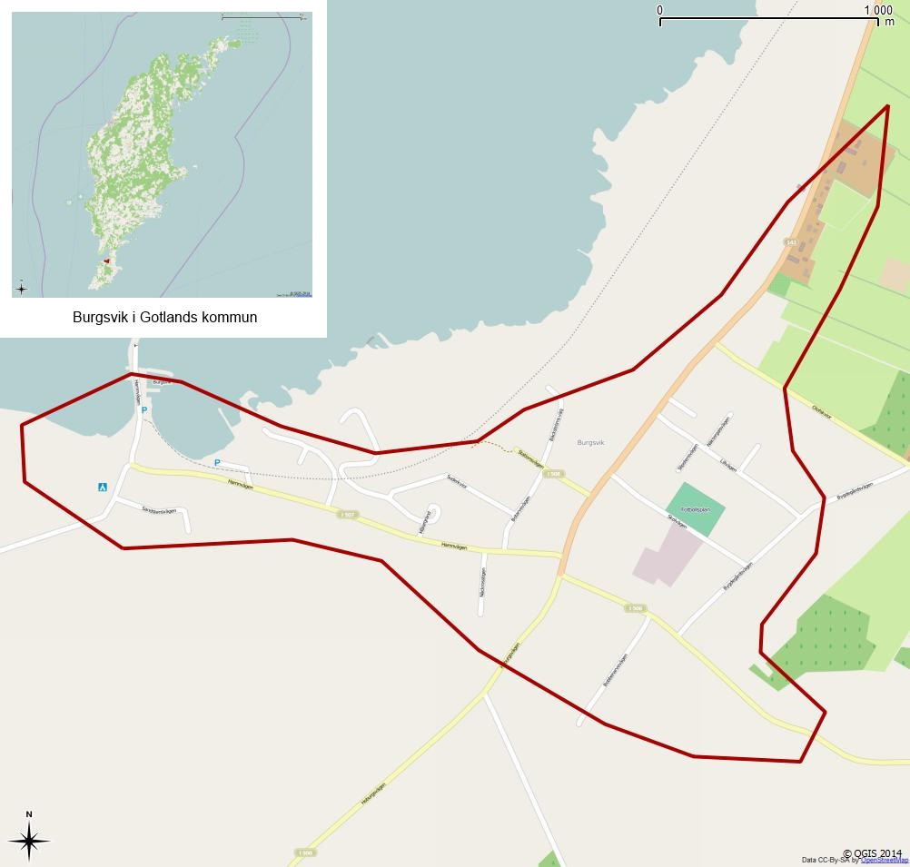 Tätorten Burgsviks gränser 1990 enligt Atlas över rikets indelningar 1992.